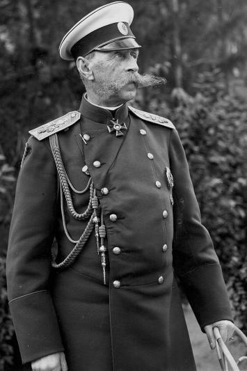 Министр императорского двора и уделов В.Б.Фредерикс